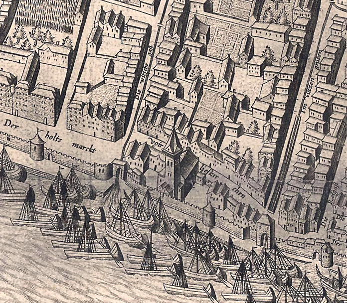 Lyskirchen, Ausschnitt des Mercator - Stadtplanes, Bereich Holzmarkt.